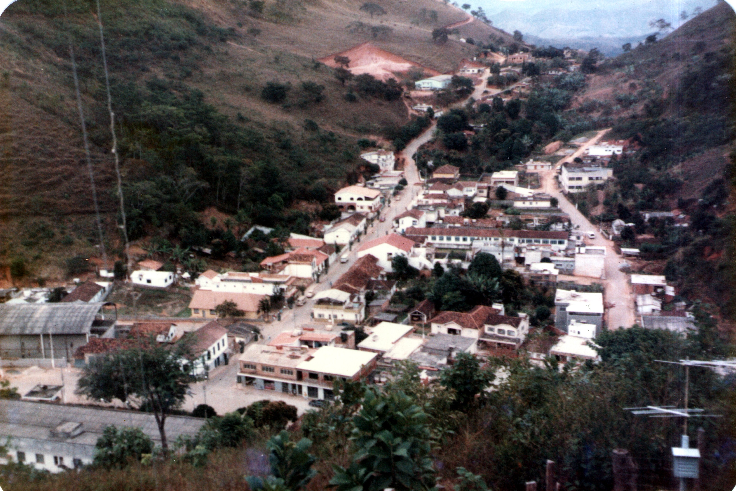 São Sebastião do Alto de outro ângulo, na década de 1980. A fotografia foi realizada da torre de transmissão de sinal aberto de TV, localizada atrás do prédio que abriga a Câmara Municipal, Prefeitura e Comarca.